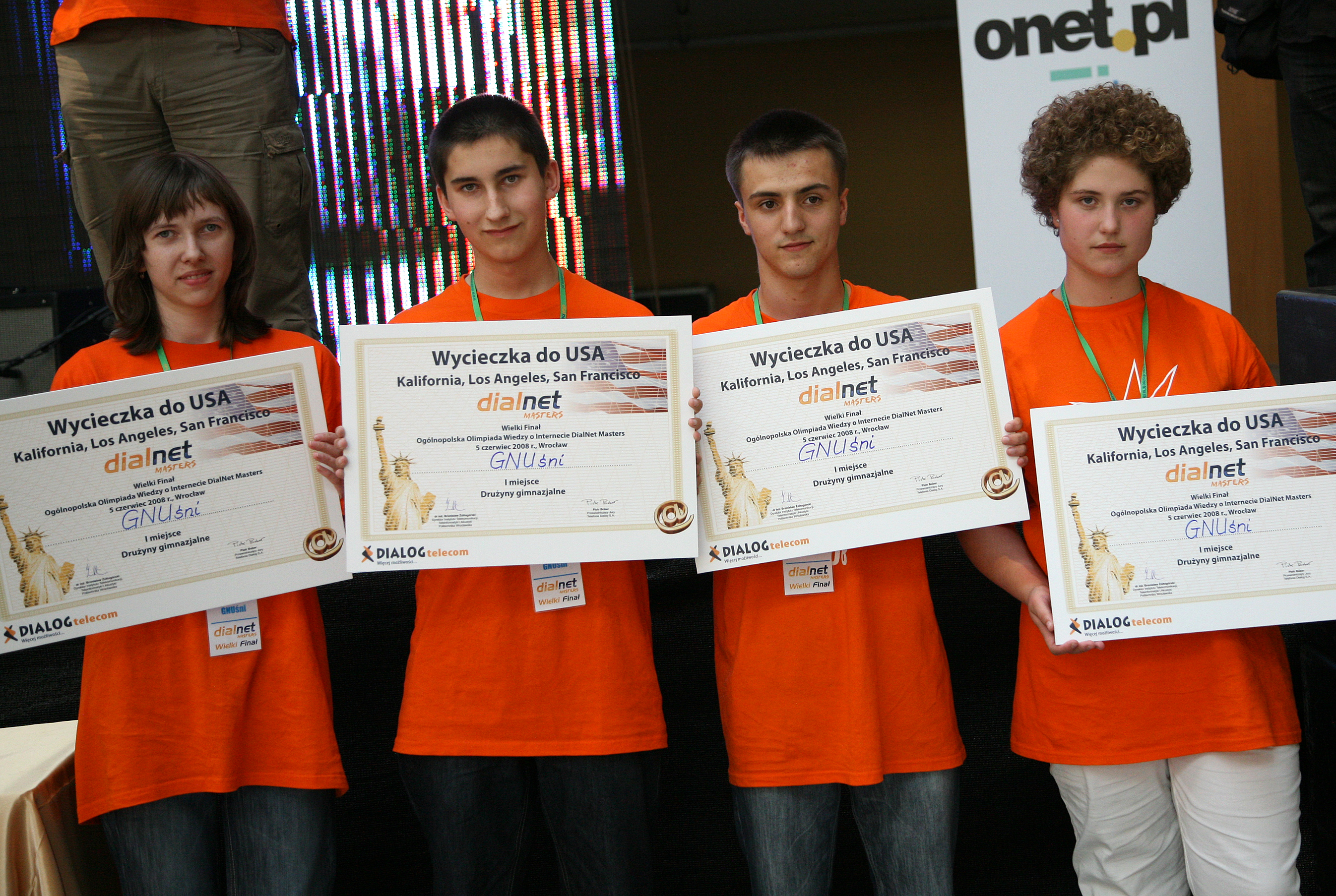 Wielki Finał DialNet Master 2008. Zwycięska drużyna "GNUśni" ze Skierbieszowa